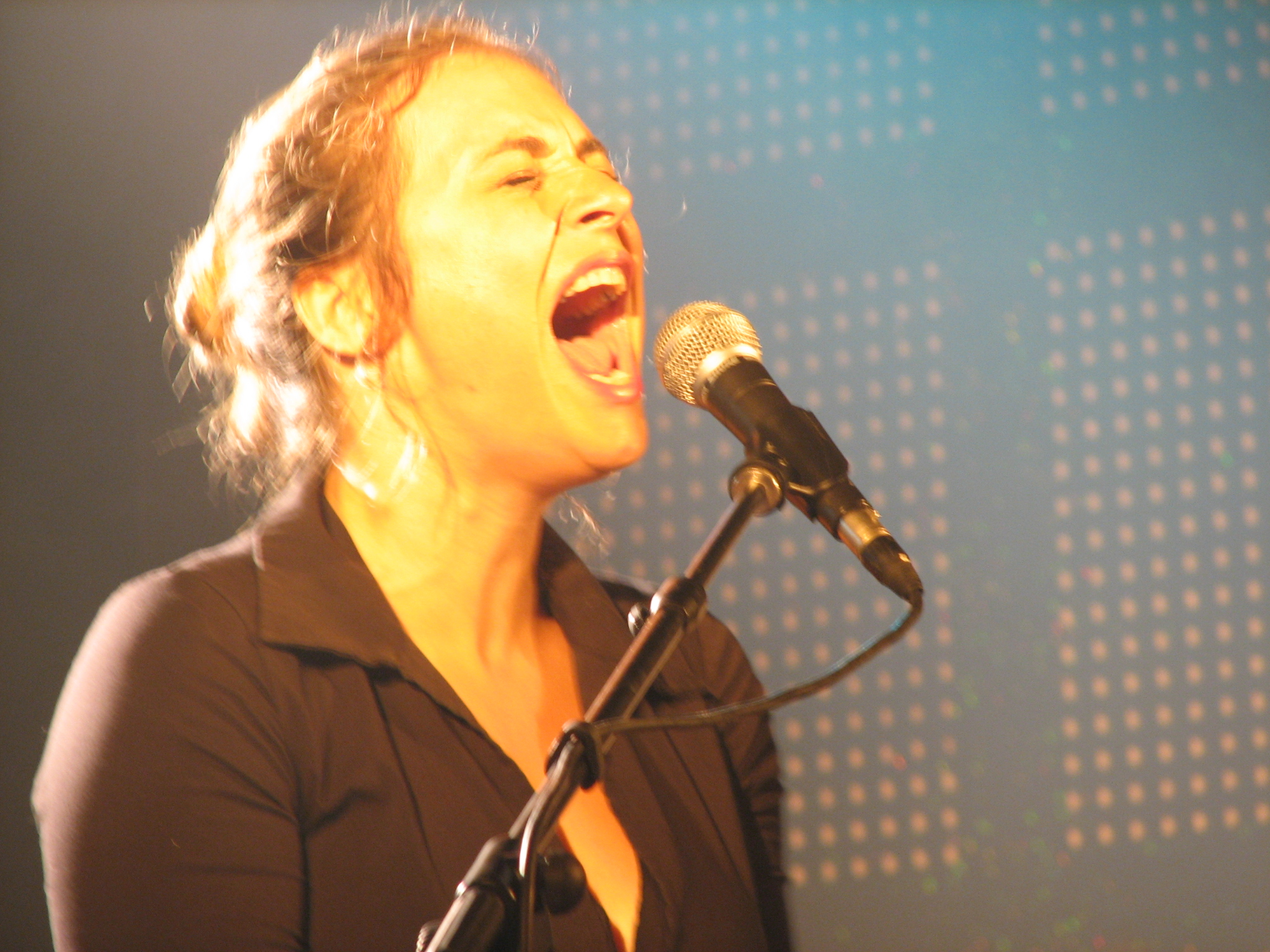 קרן פלס בהופעה